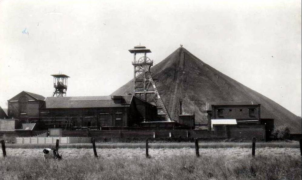 La fosse Cuvinot de la Compagnie des mines d'Anzin était un charbonnage constitué de deux puits situé à Onnaing, Nord, Nord-Pas-de-Calais, France.